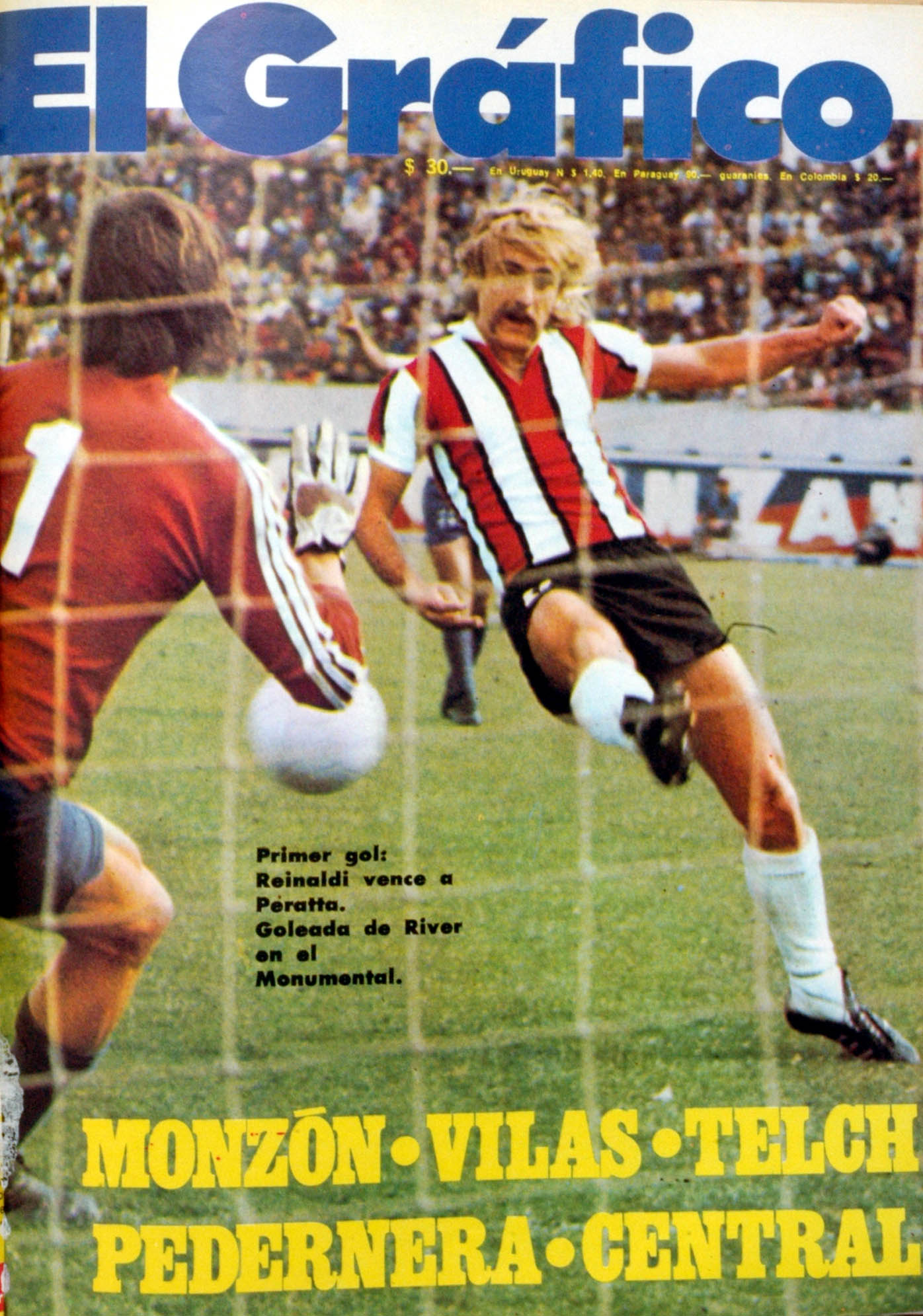 El Grafico del 12 de Noviembre de 1975. Edicion 2927